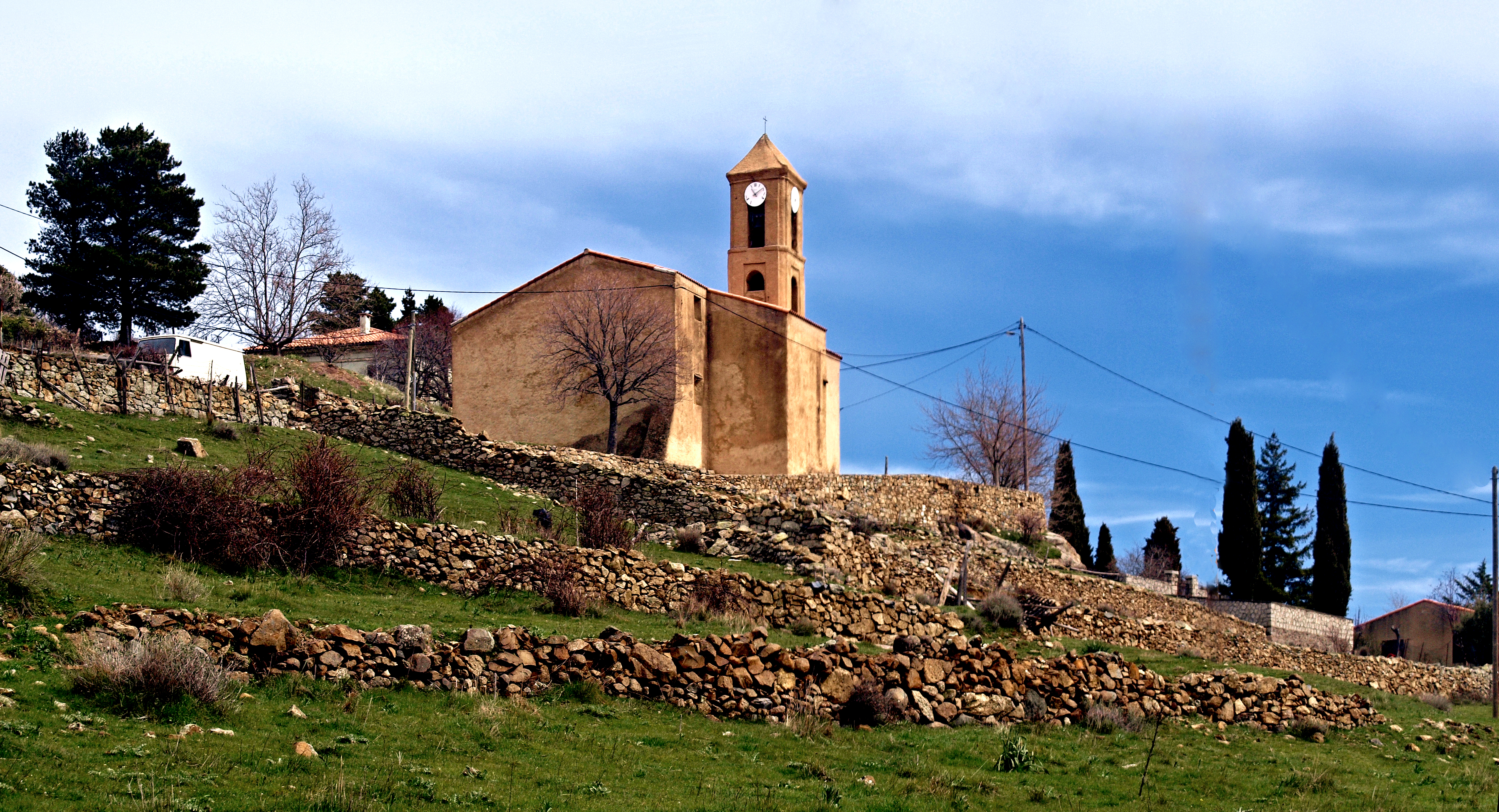 Corscia (Corsica) - Église paroissiale San Salvadore